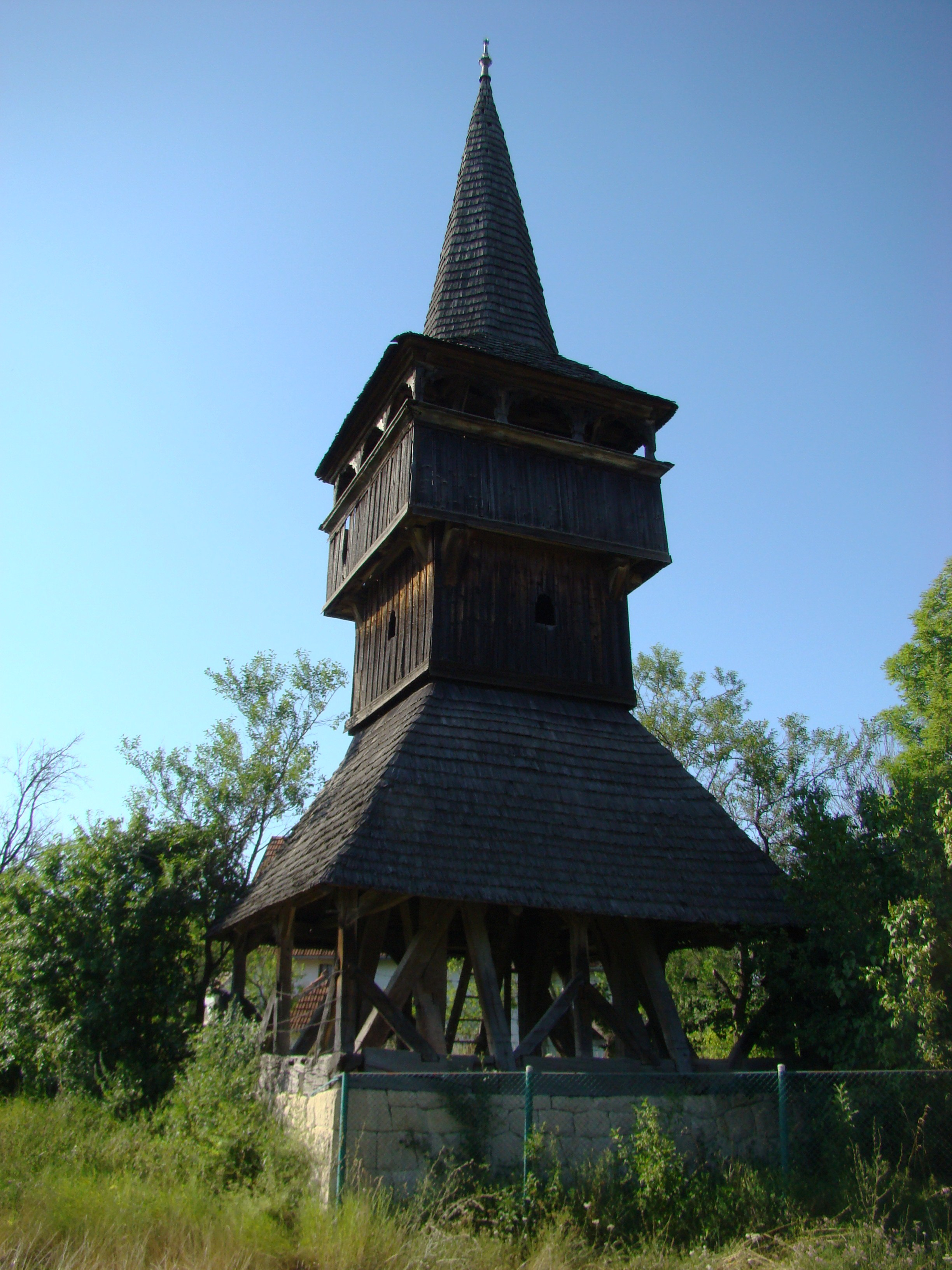 Clopotniţa de lemn, sat SFĂRAŞ; comuna ALMAŞU 02